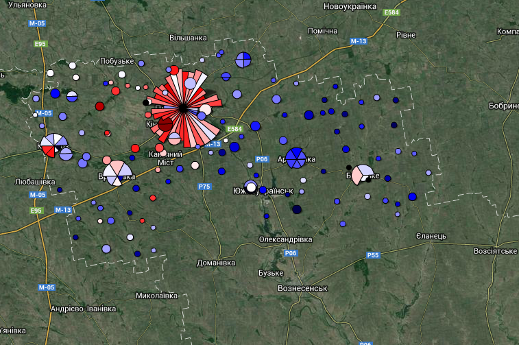 Результати повторних виборів народних депутатів 15 грудня 2013 р. на окрузі № 132